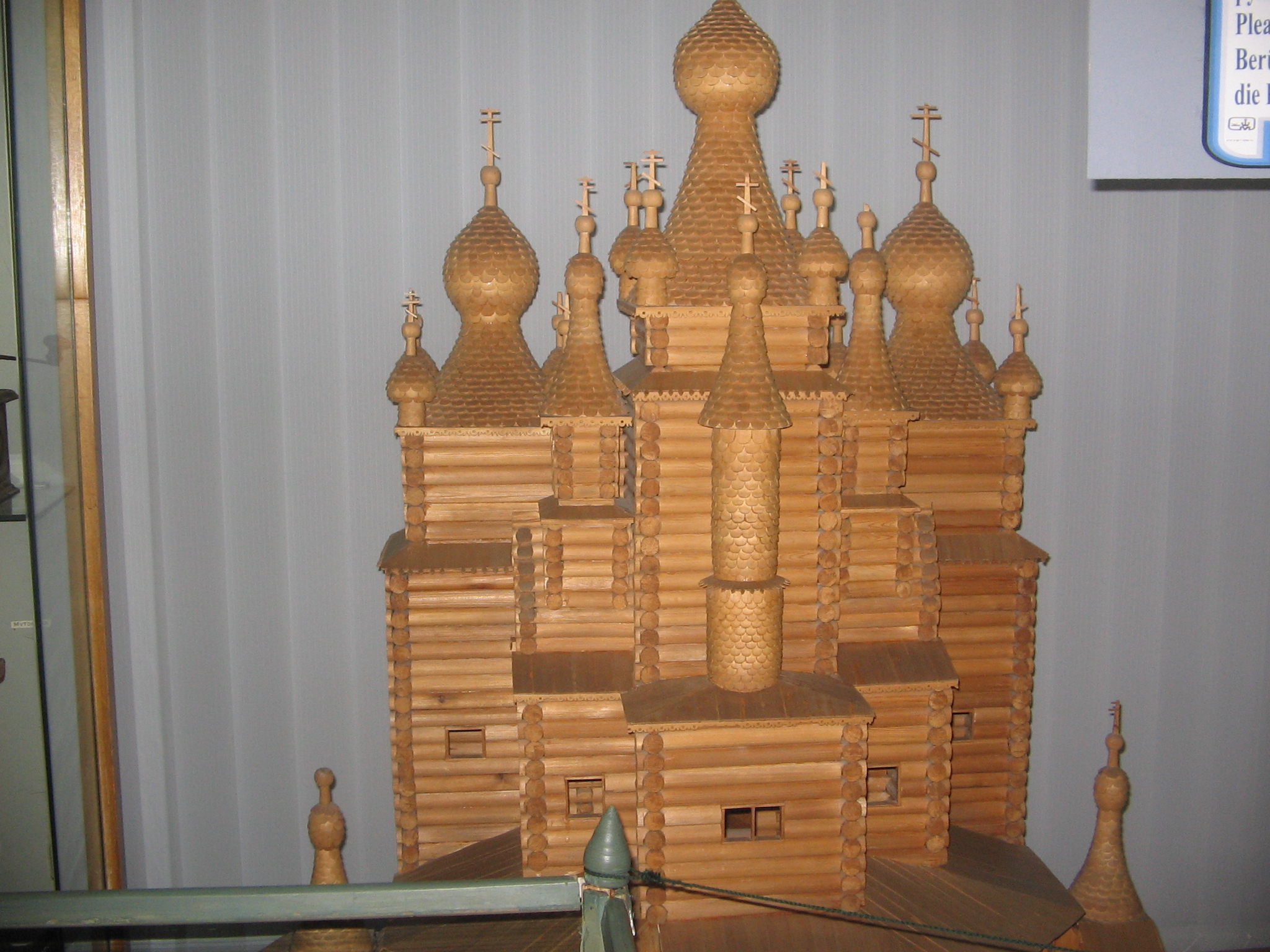 Воскресенский собор (Кола) в Мурманском краеведческом музее